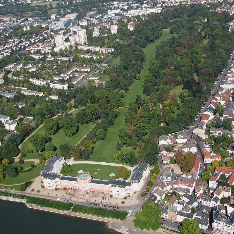 Luftbild Wiesbaden Schlosspark mit Schloss Biebrich am Rhein